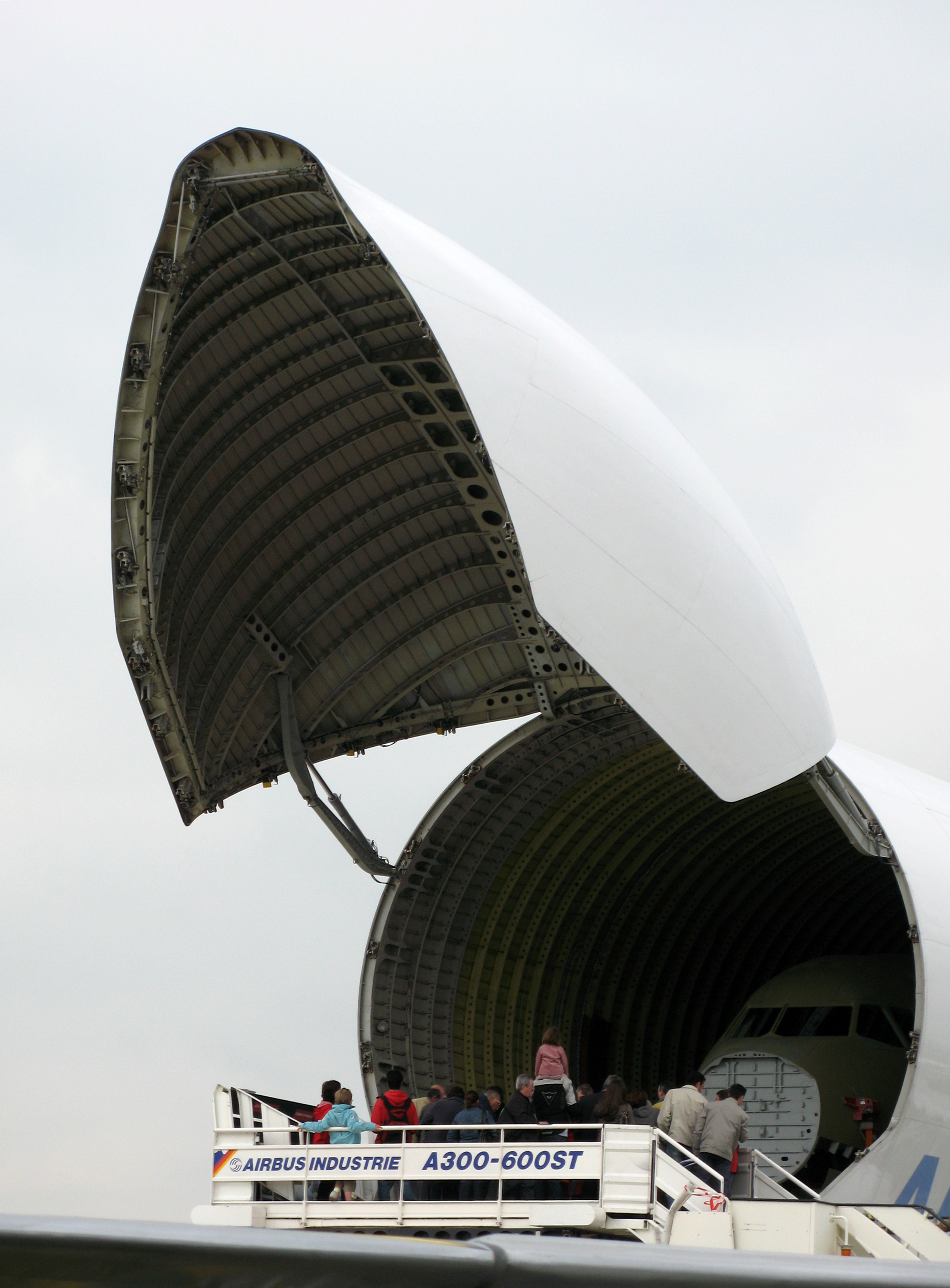 Meeting aérien du samedi 7 juin 2008 à Méaulte (Aéroport d'Albert-Picardie) (Somme, France) - L'Airbus Beluga. .